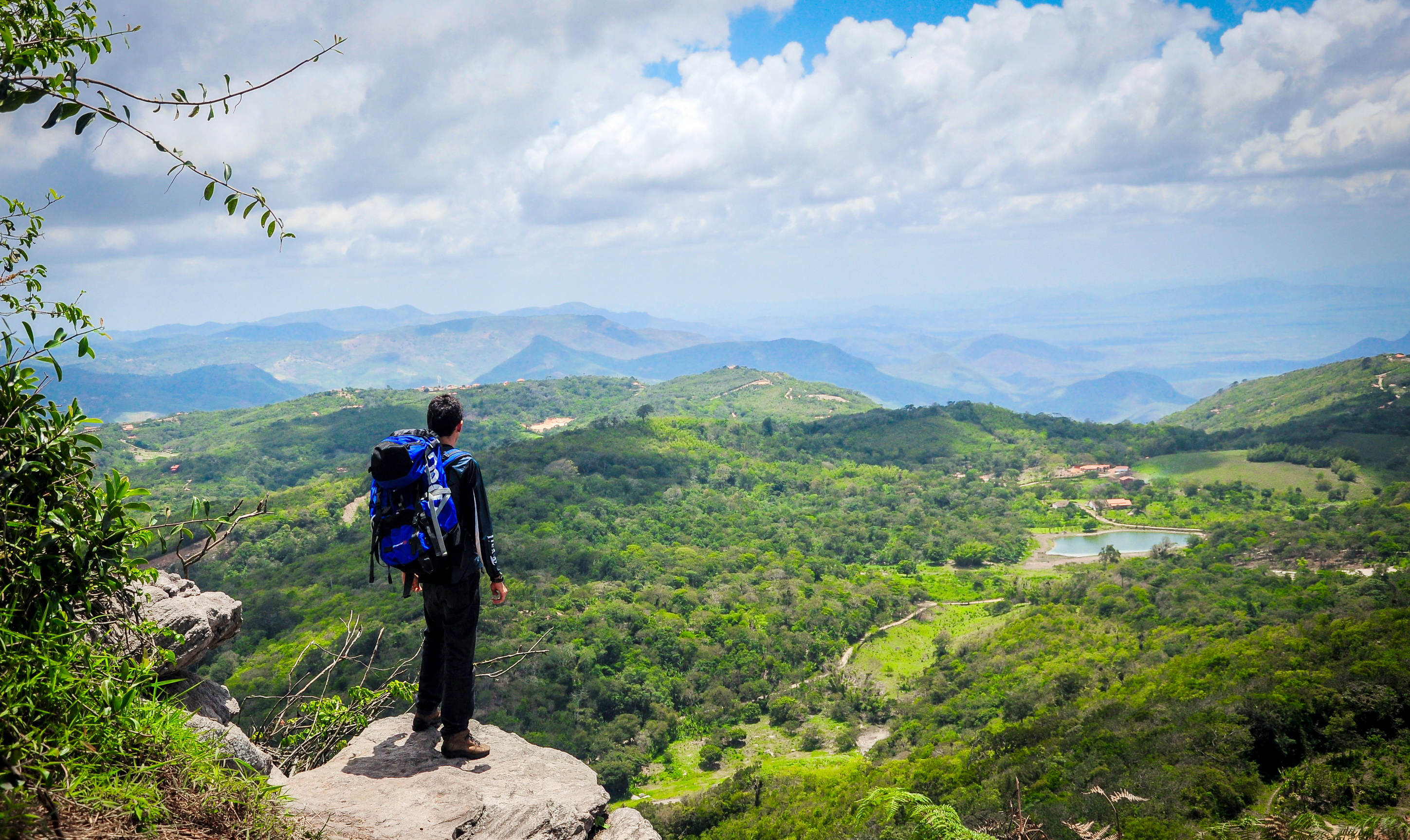 Fotos tiradas no âmbito de Guaramiranga e Baturité